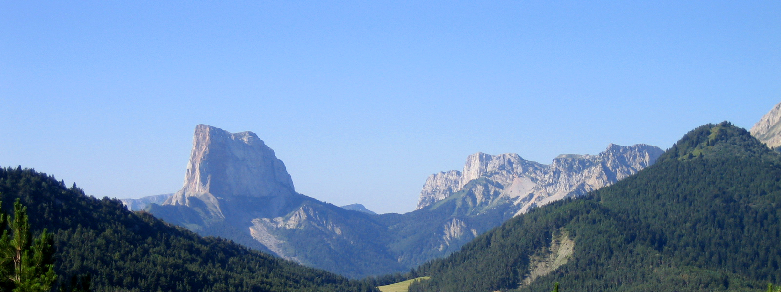 Gresse-en-Vercors (Isère, France) - Pendant la montée au Pas du Serpaton, vue sur le Mont Aiguille. Le village de Gresse est en contrebas, à droite (invisible ici, hors du cadre de cette photo, et caché dans la vallée et par les arbres).